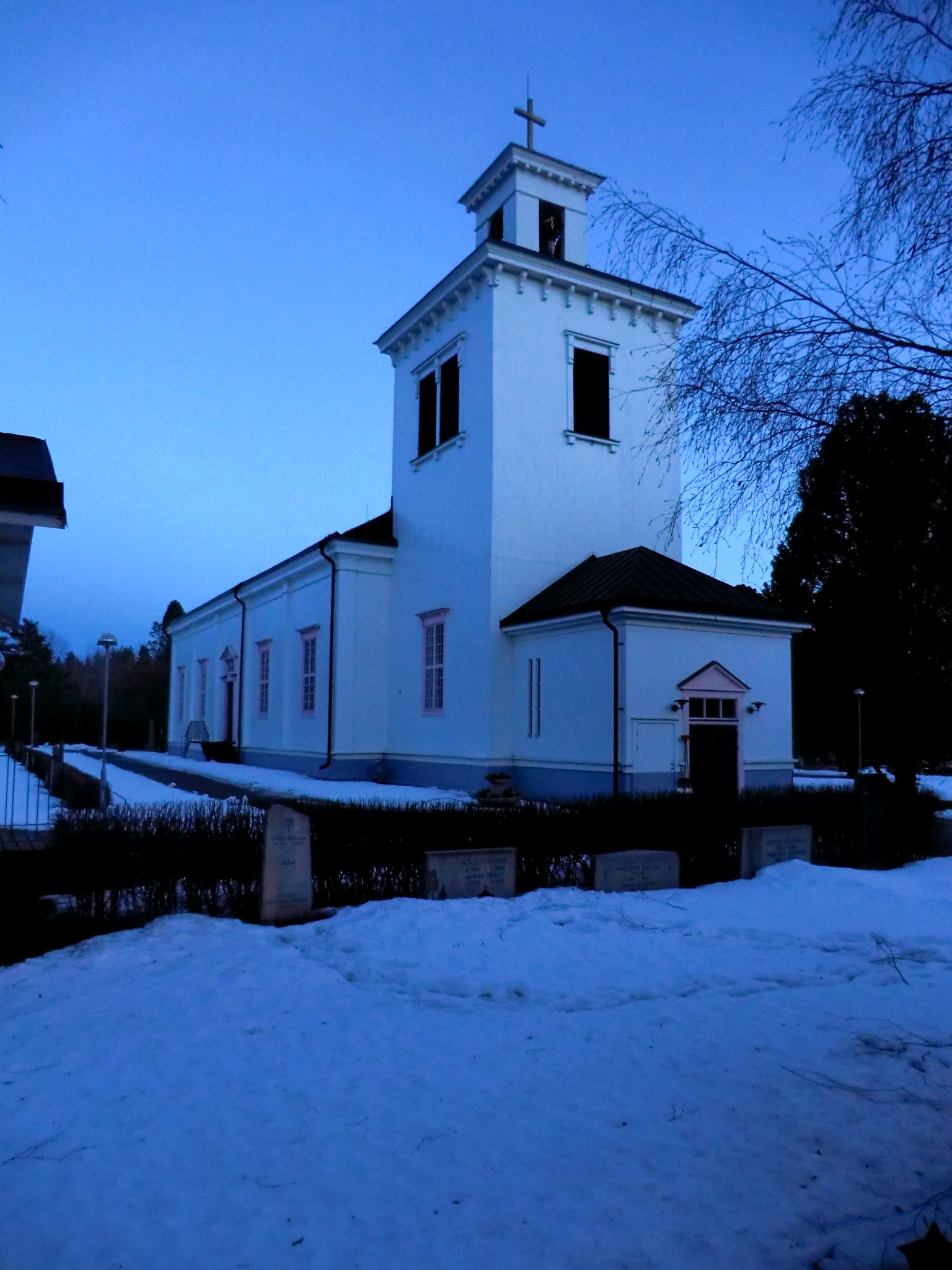 Mo kyrka i skymningen.